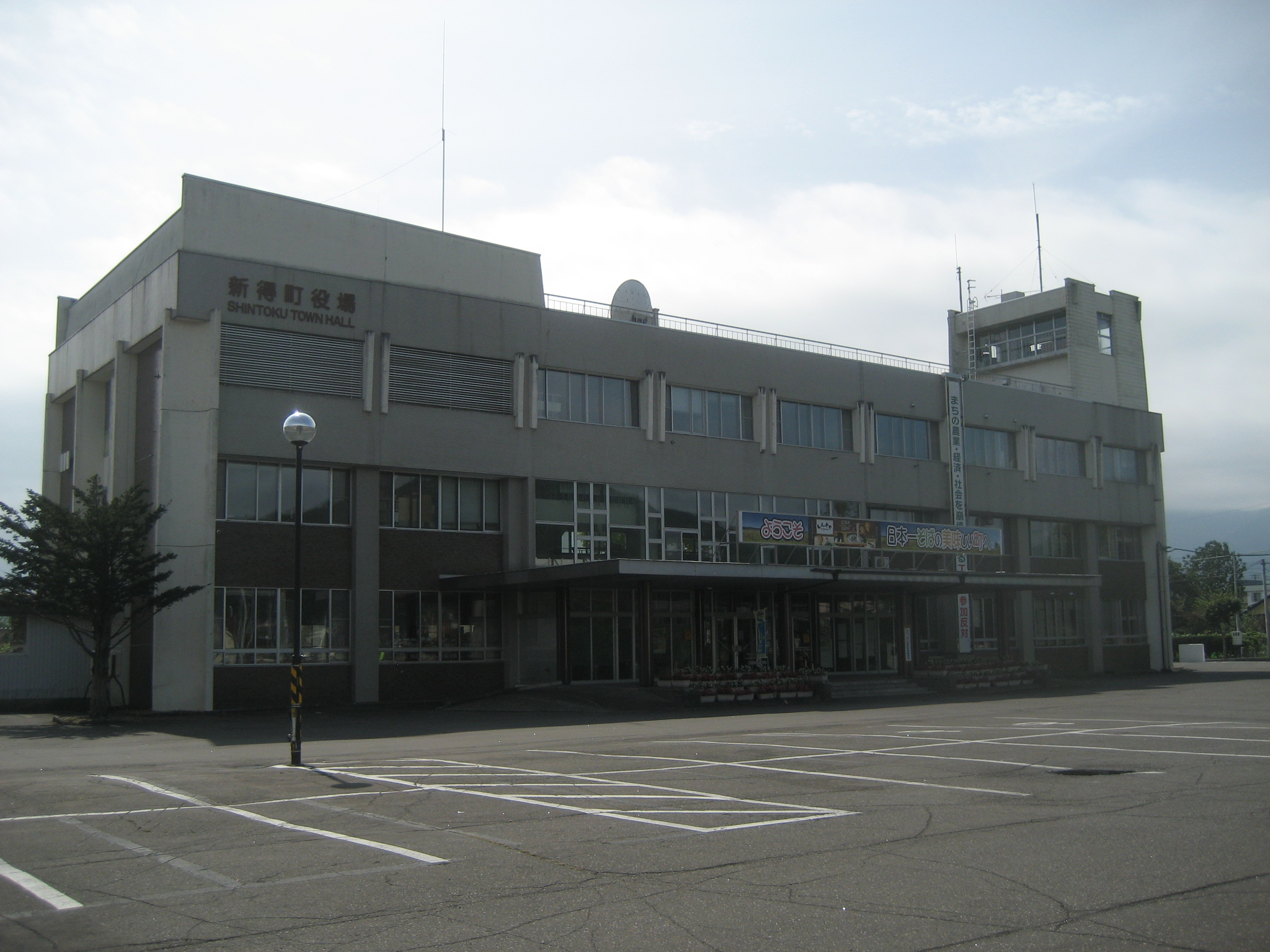 北海道にある新得町役場庁舎